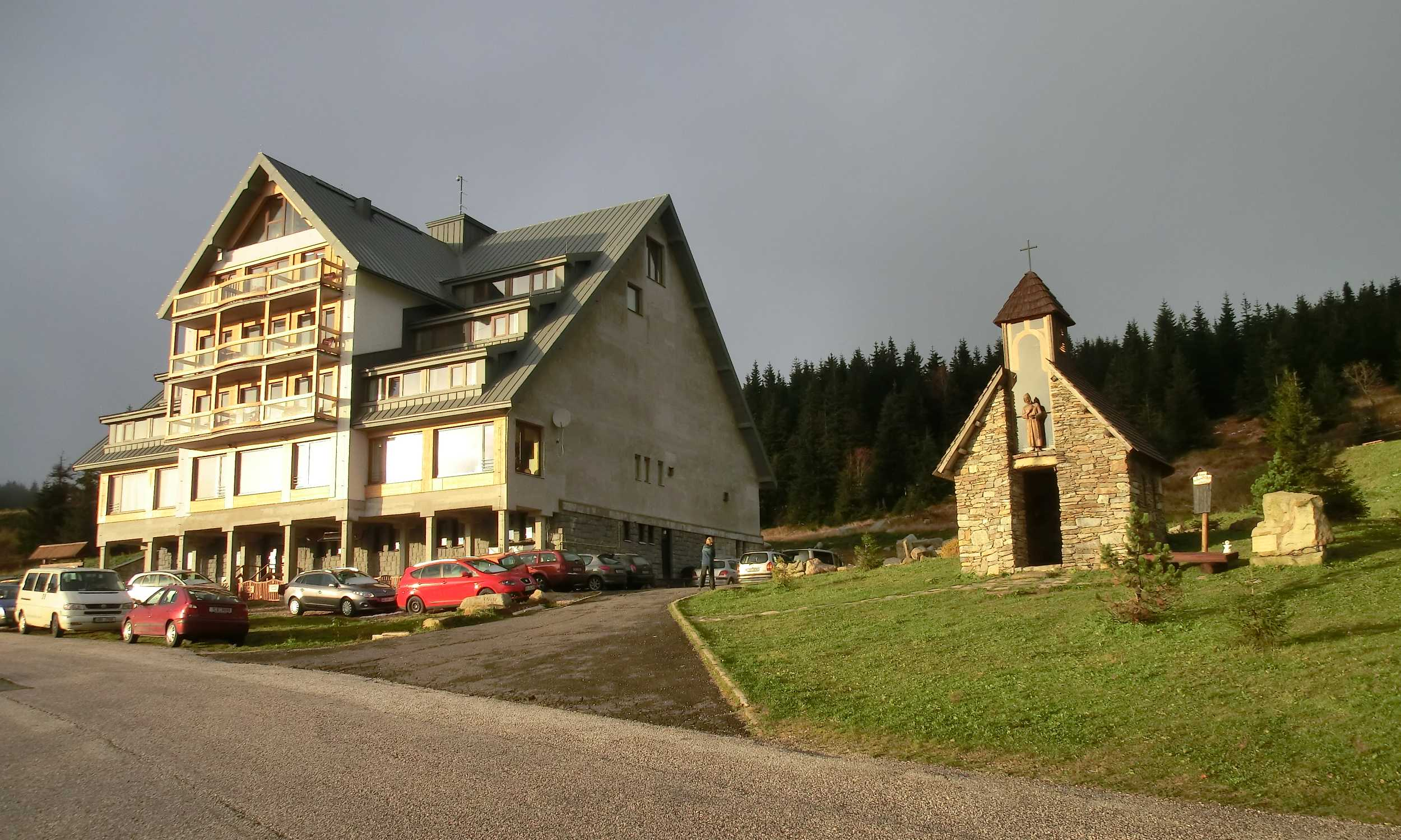 Erlebachova bouda (v nedokončeném rekonstrukčním stavu) a kaple sv. Františka z Assisi.